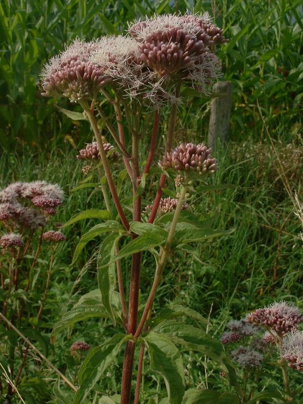 Eupatoire à feuilles de chanvre, photo J.F. Gaffard, Vantoux-et-Longevelle, Août 2004